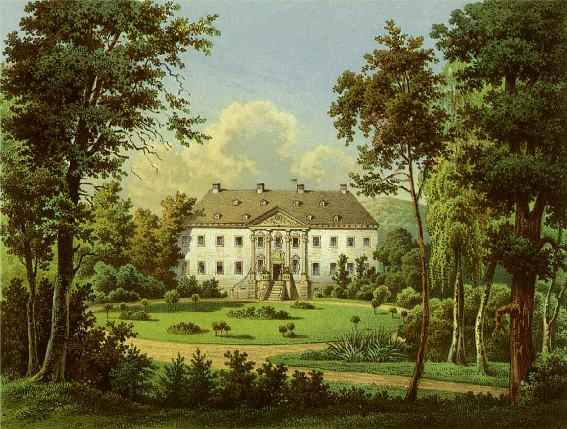 Schloss Alme, Kreis Brilon